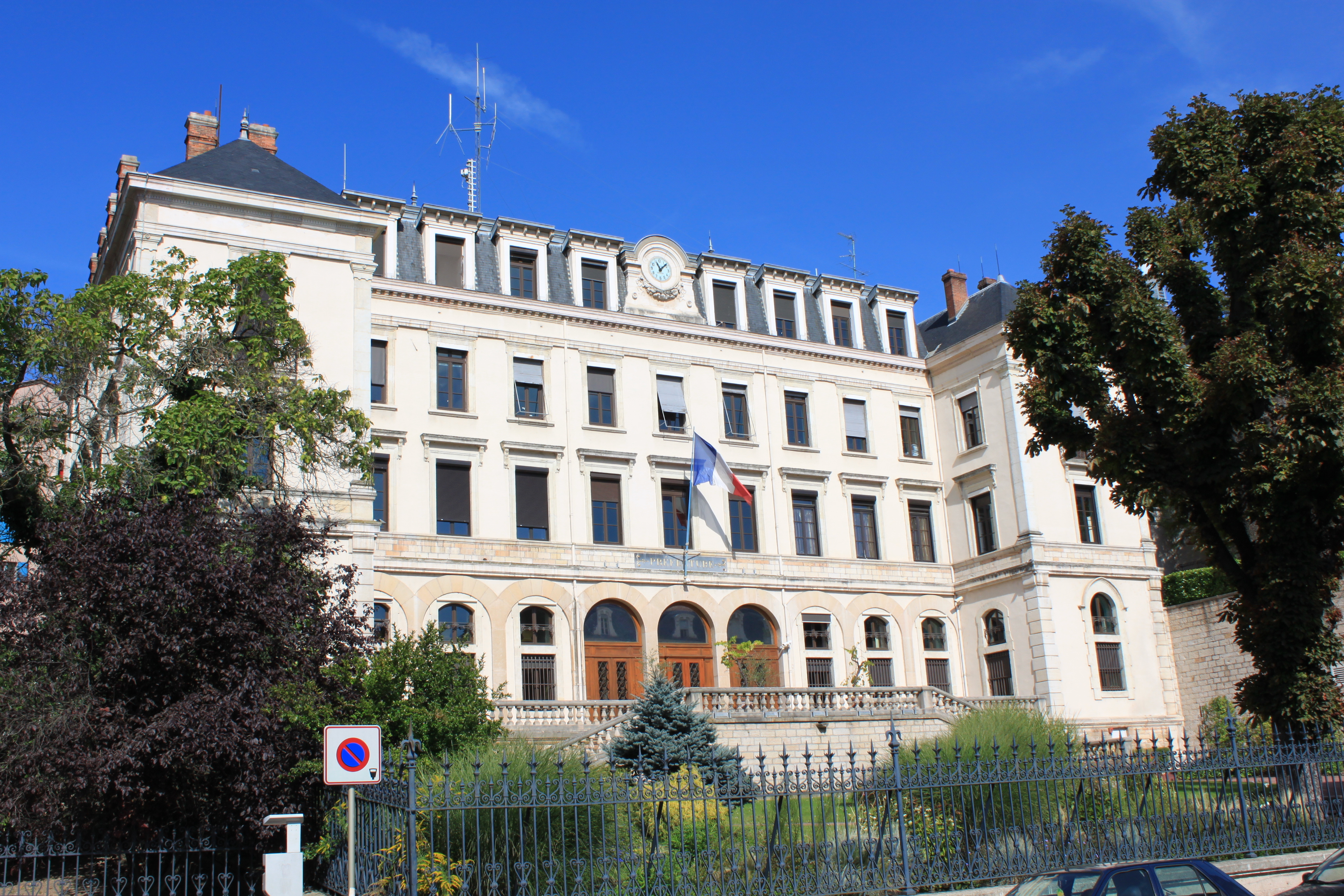 Mâcon, Saône-et-Loire, Bourgogne, France